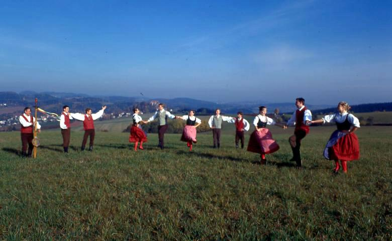 Soubor písní a tanců